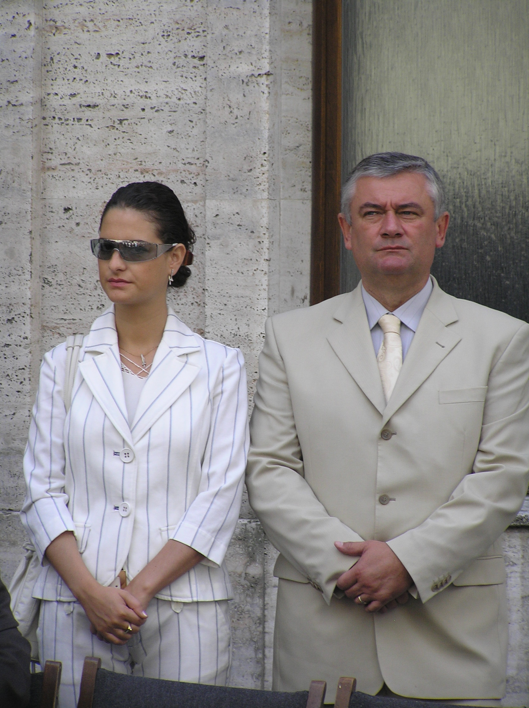 Príhovor Ľubka a Ján Slota